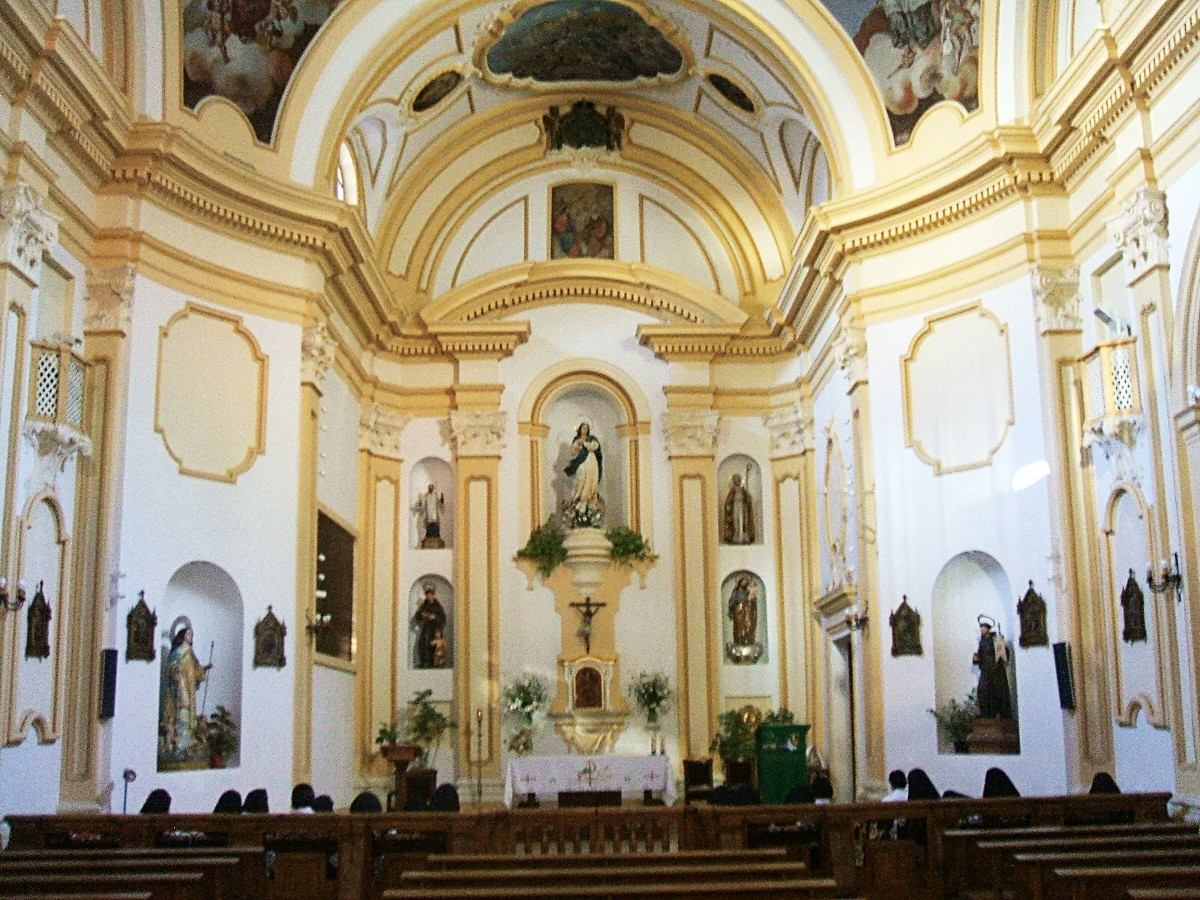 iglesia del Convento de la Concepción Franciscana, Cuenca (España)